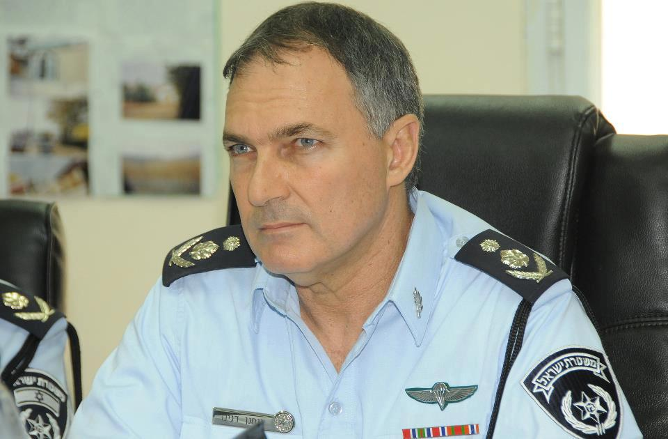 מפכ"ל משטרת ישראל יוחנן דנינו